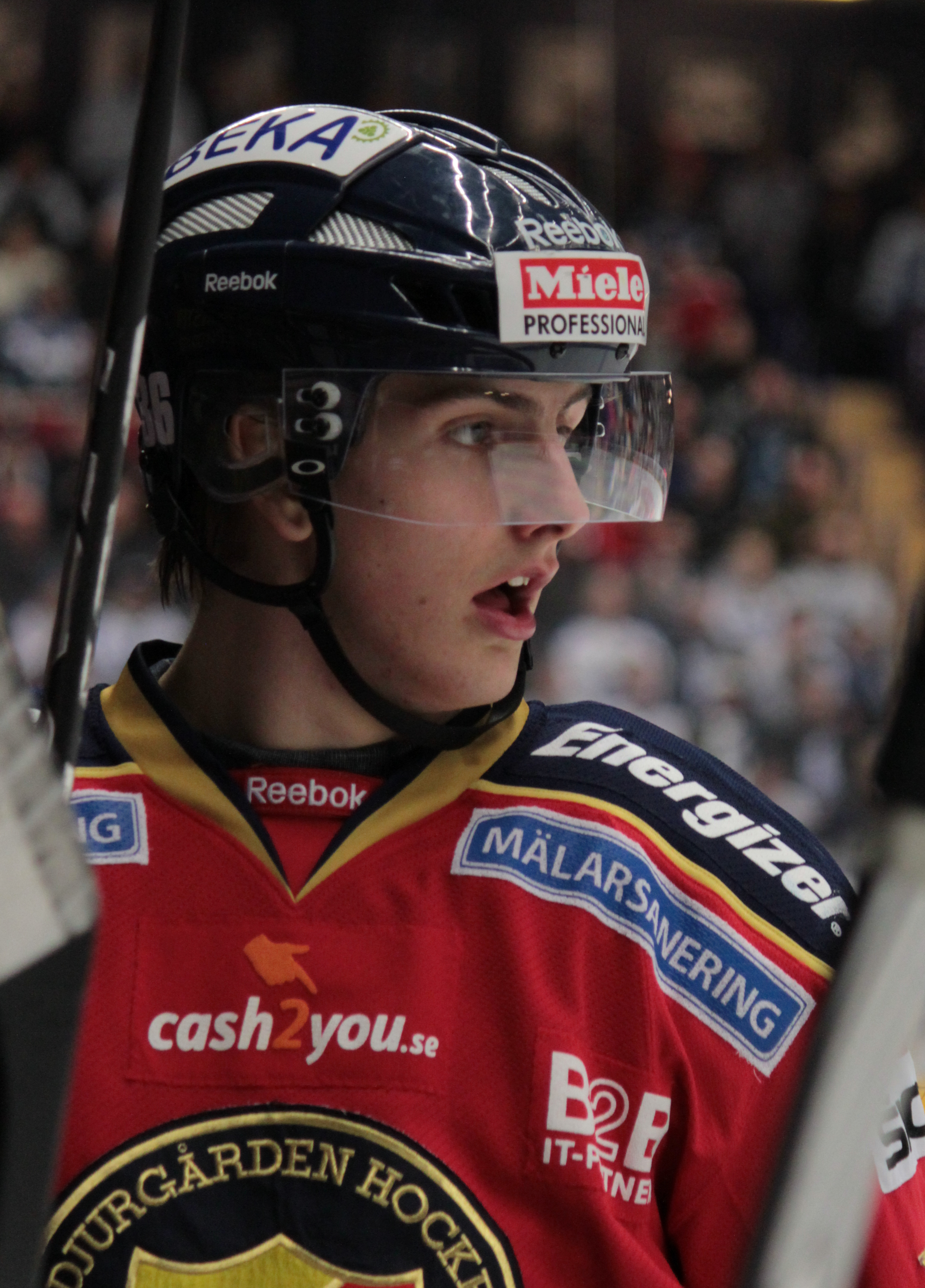 Philip Holm i kvalmatchen mellan Leksands IF och Djurgårdens IF i Leksand 2012-03-31